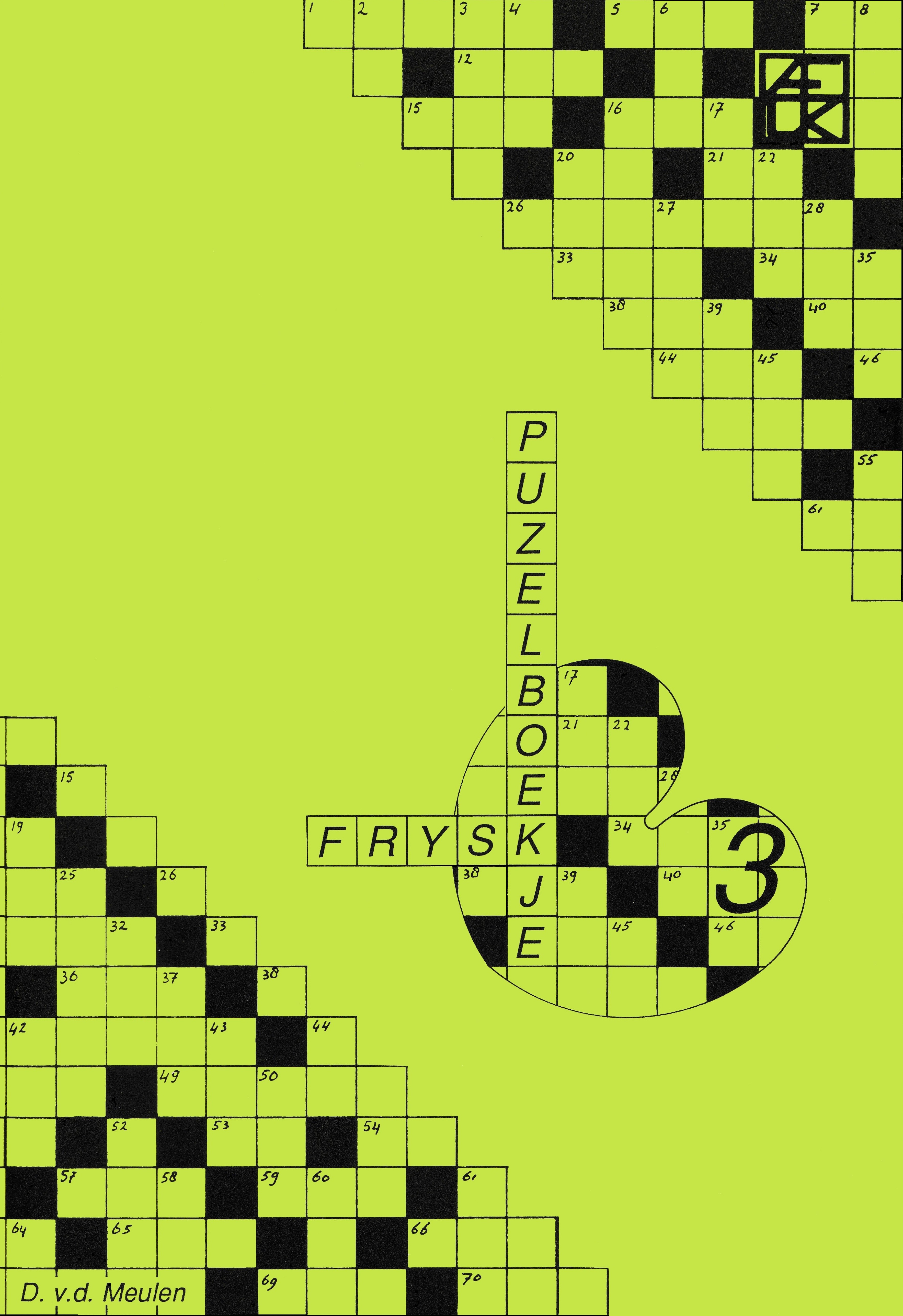 FryskPuzelboekje3 VDM, ynskende ôfbyld frijjûn troch de Afûk op 27 oktober 2008